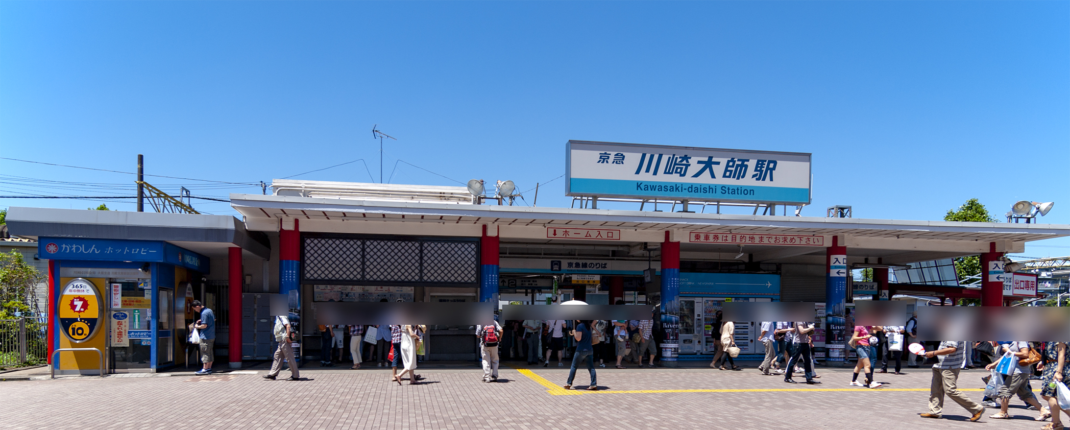 京浜急行電鉄株式会社大師線川崎大師駅駅舎（旧駅名標）